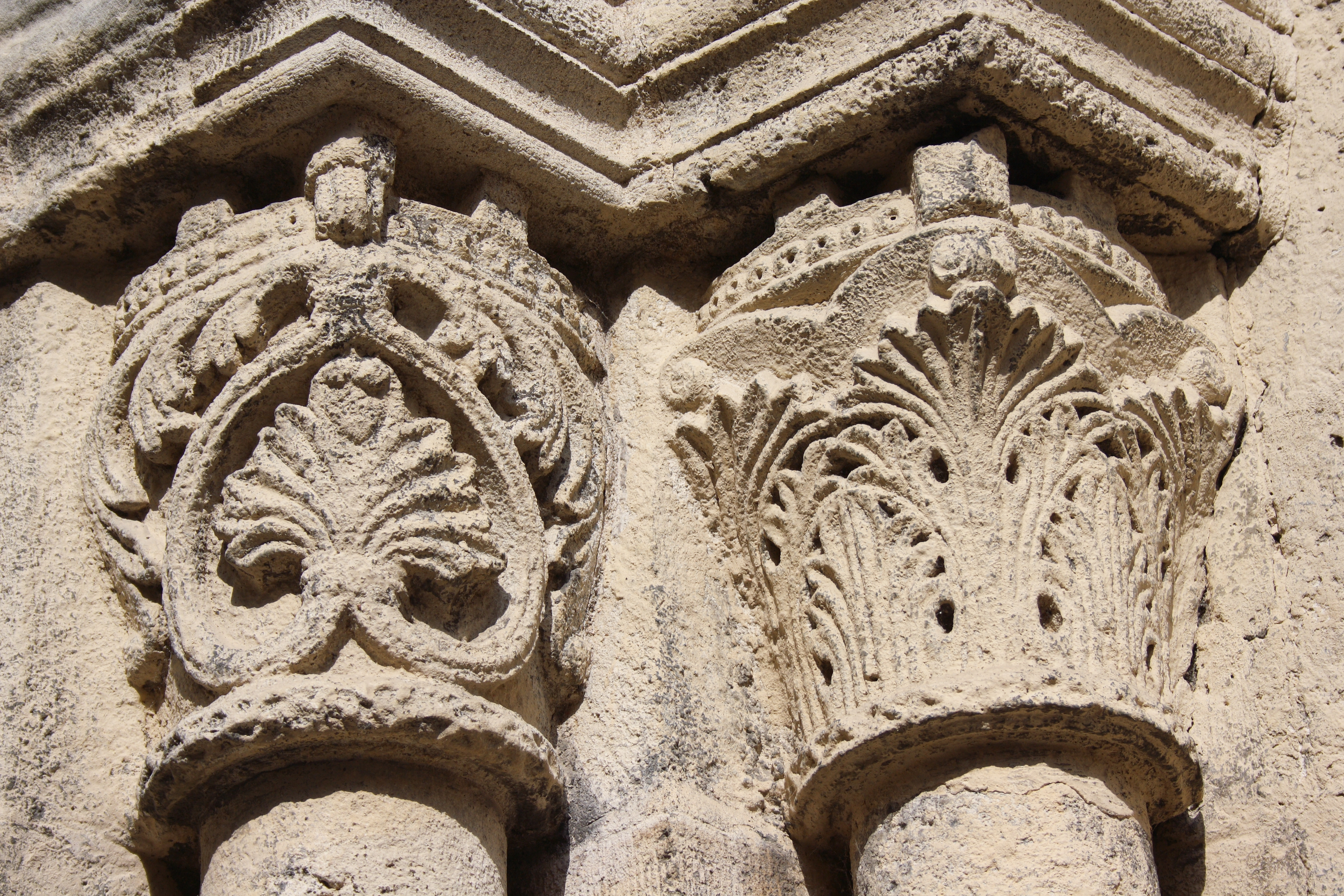 katholische Pfarrkirche Saint-Justin in Louvres, Säulen mit Kapitellen am Portal